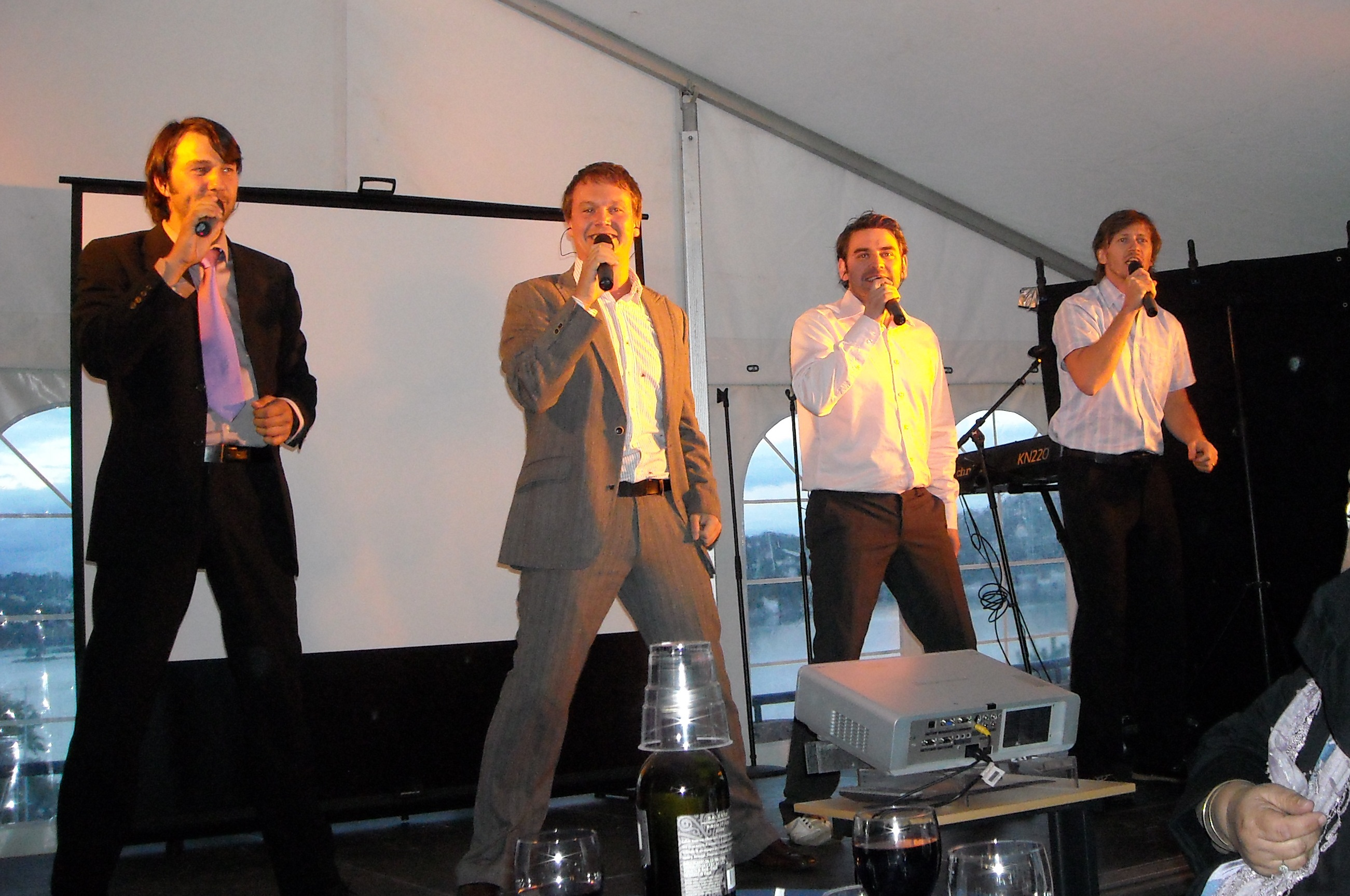 Underholdningsgruppa Cheezy Keys i Arendal